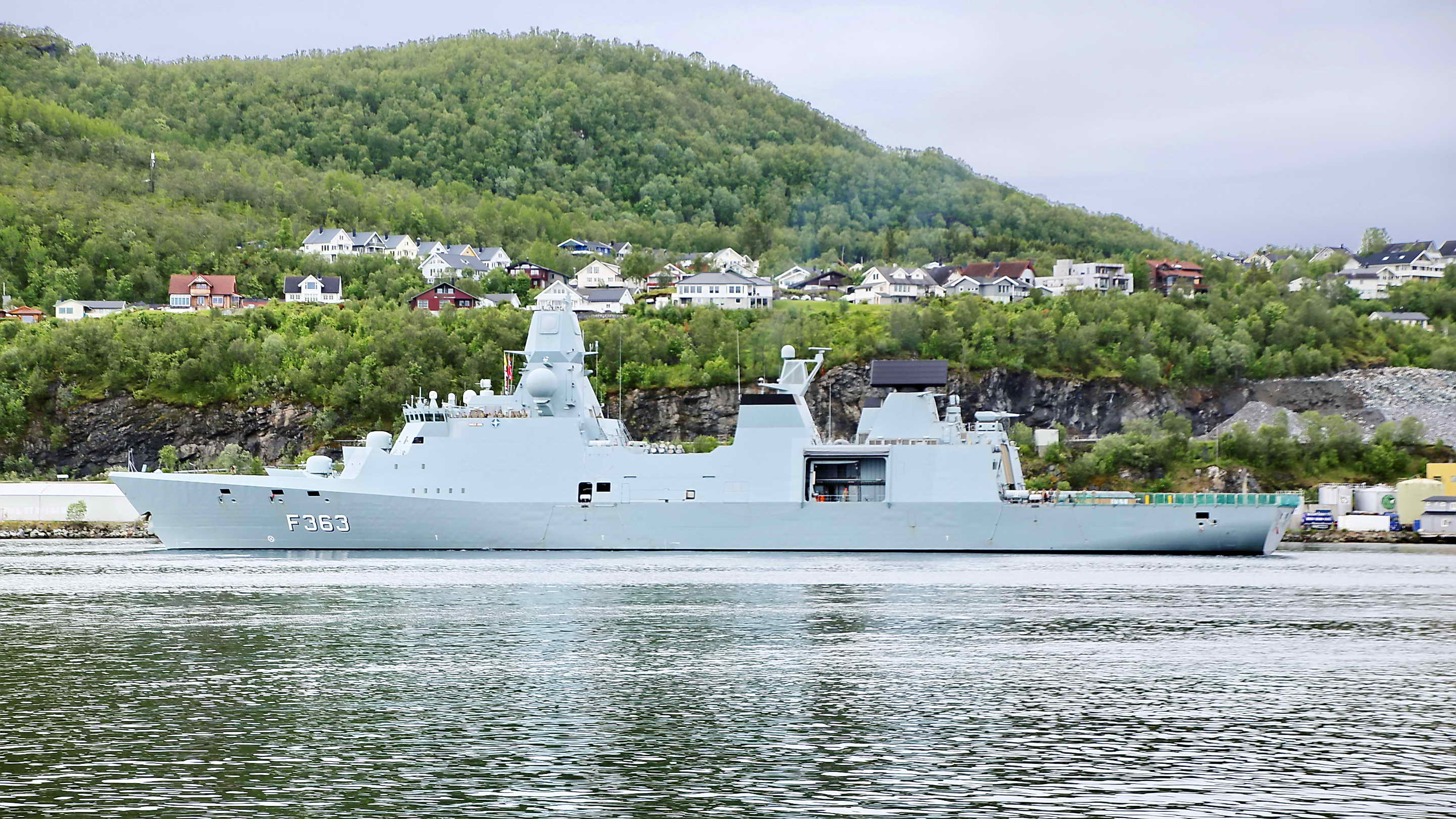 Flugabwehr-Fregatte "Niels Juel" (F363) im Juni 2018 in Harstad, Norwegen